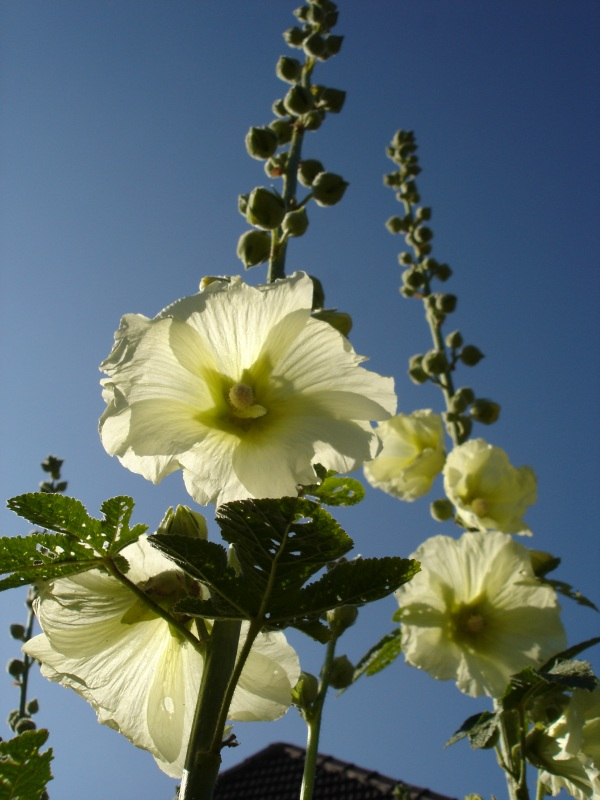 Alcea rosea, 16 juillet 2004, Dieppe